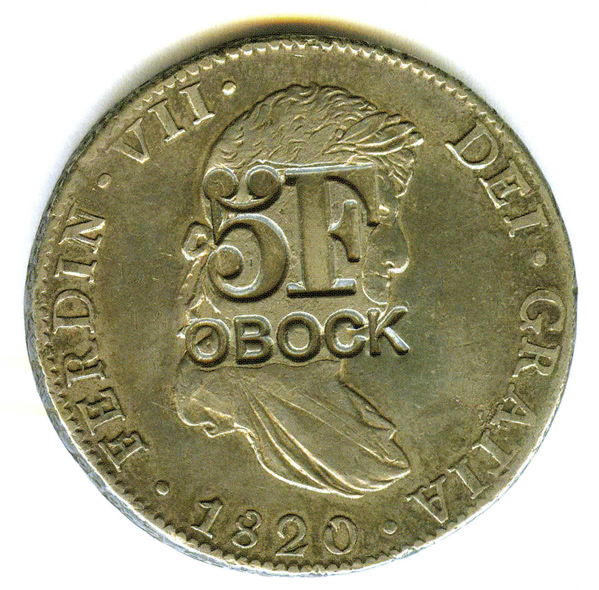 Moneda con resello que circuló en Obock.